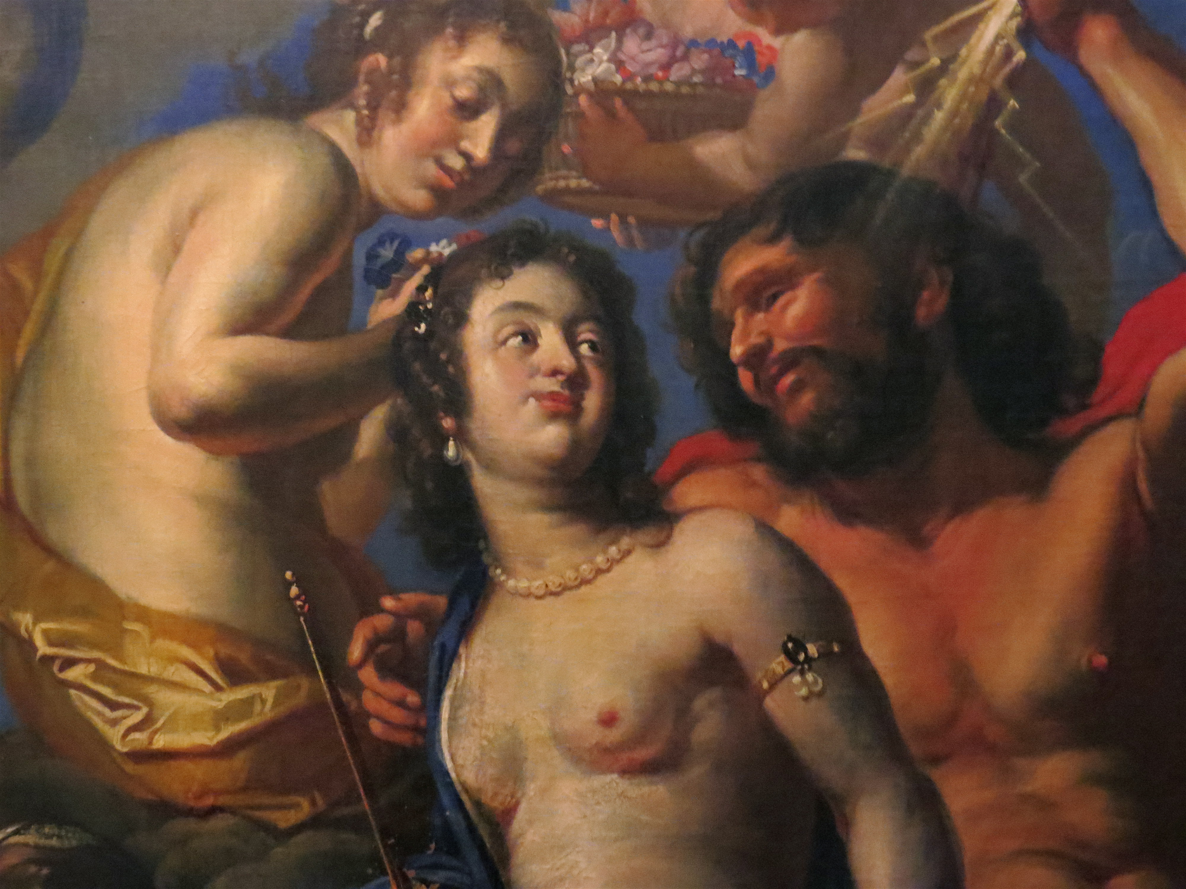 Hera og Zeus på Olympen, Hera formentlig forestillende dronning Sophie Amalie af Danmark og Norge, udsnit af loftsmaleri af Abraham Wuchters i 1660'erne, Rosenborg Slot, København